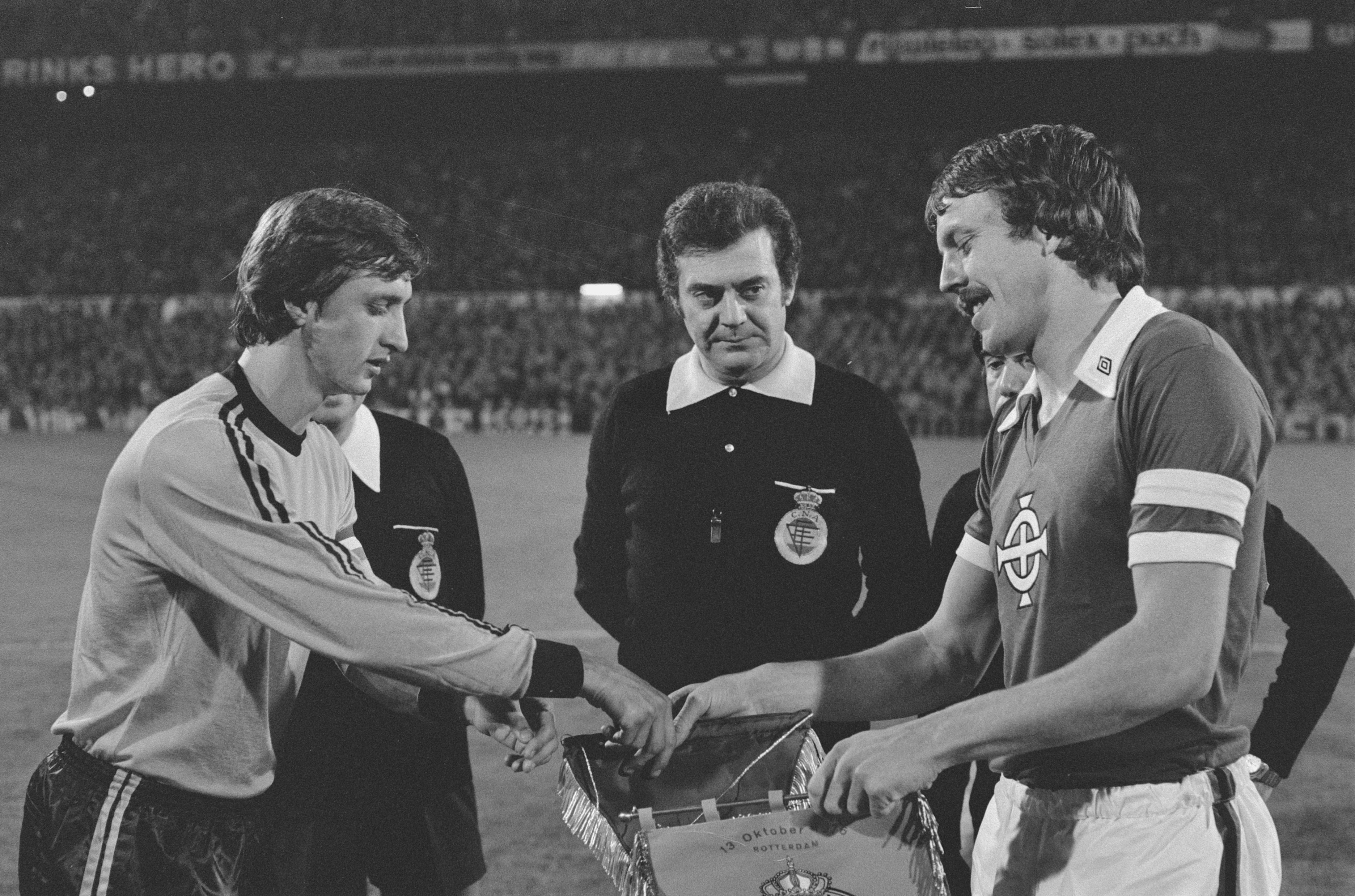 Collectie / Archief : Fotocollectie Anefo Reportage / Serie : [ onbekend ] Beschrijving : Nederland tegen Noord Ierland ; aanvoerders Cruijff en de Noord-Ierse aanvoerder Allan Hunter reiken voor aanvang elkaar de hand Datum : 13 oktober 1976 Locatie : Nederland, Noord-Ierland Trefwoorden : sport, voetbal Persoonsnaam : Cruijff, Johan Fotograaf : Peters, Hans / Anefo Auteursrechthebbende : Nationaal Archief Materiaalsoort : Negatief (zwart/wit) Nummer archiefinventaris : bekijk toegang 2.24.01.05 Bestanddeelnummer : 928-8291